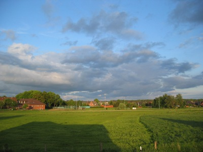 Der Sportplatz (mit Tennisplatz) und die Mehrzweckhalle von Todendorf.